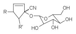 tetraphyllin, gynocardin